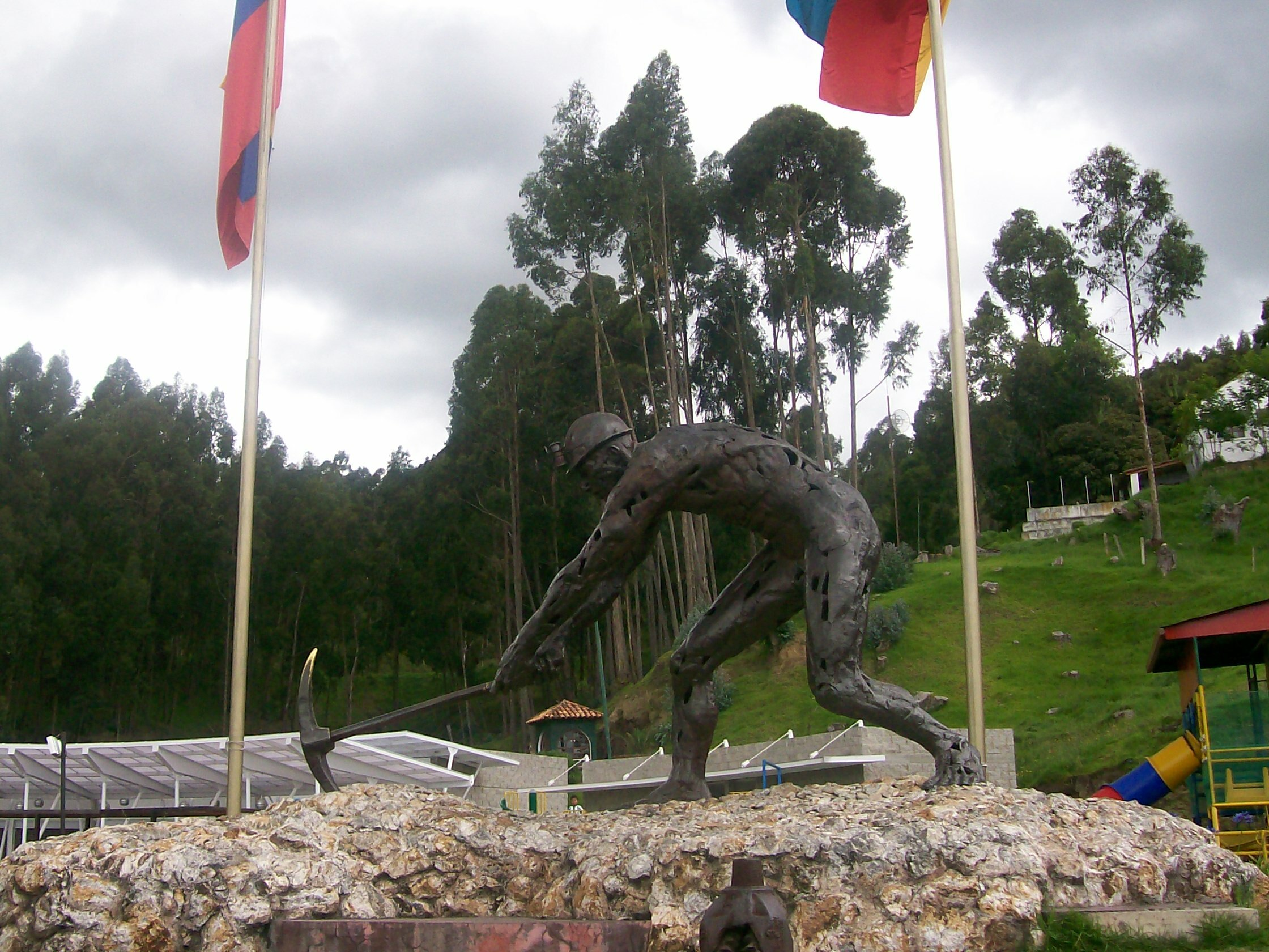 Monumento al Minero, en Zipaquirá